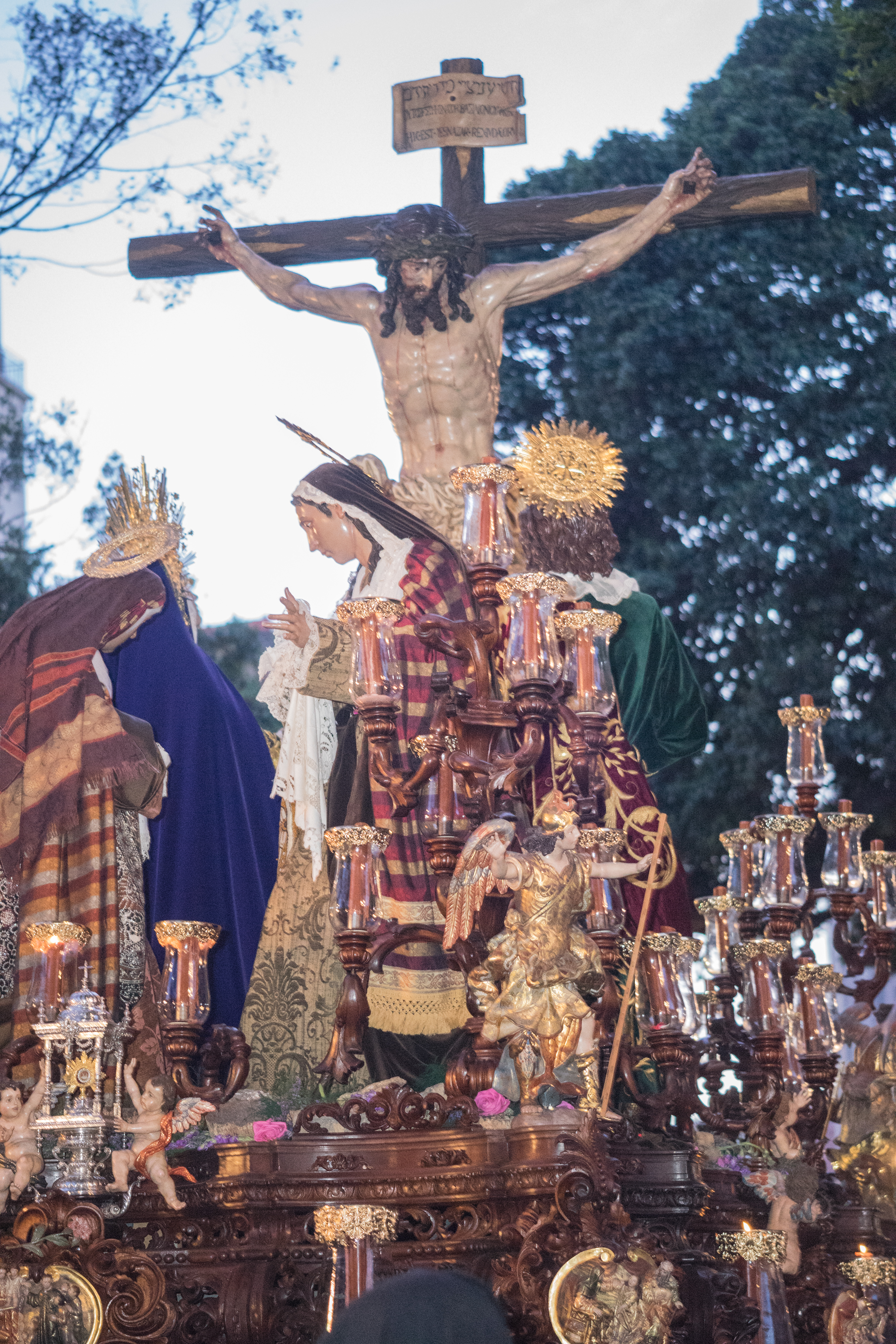 Hermandad Salesiana y Cofradía de Nazarenos del Santo Cristo de las Penas, María Santísima del Auxilio, San Juan Evangelista y San Juan Bosco This is a photography of a Folklore festival in Spain (Wikidata id Q9075883).